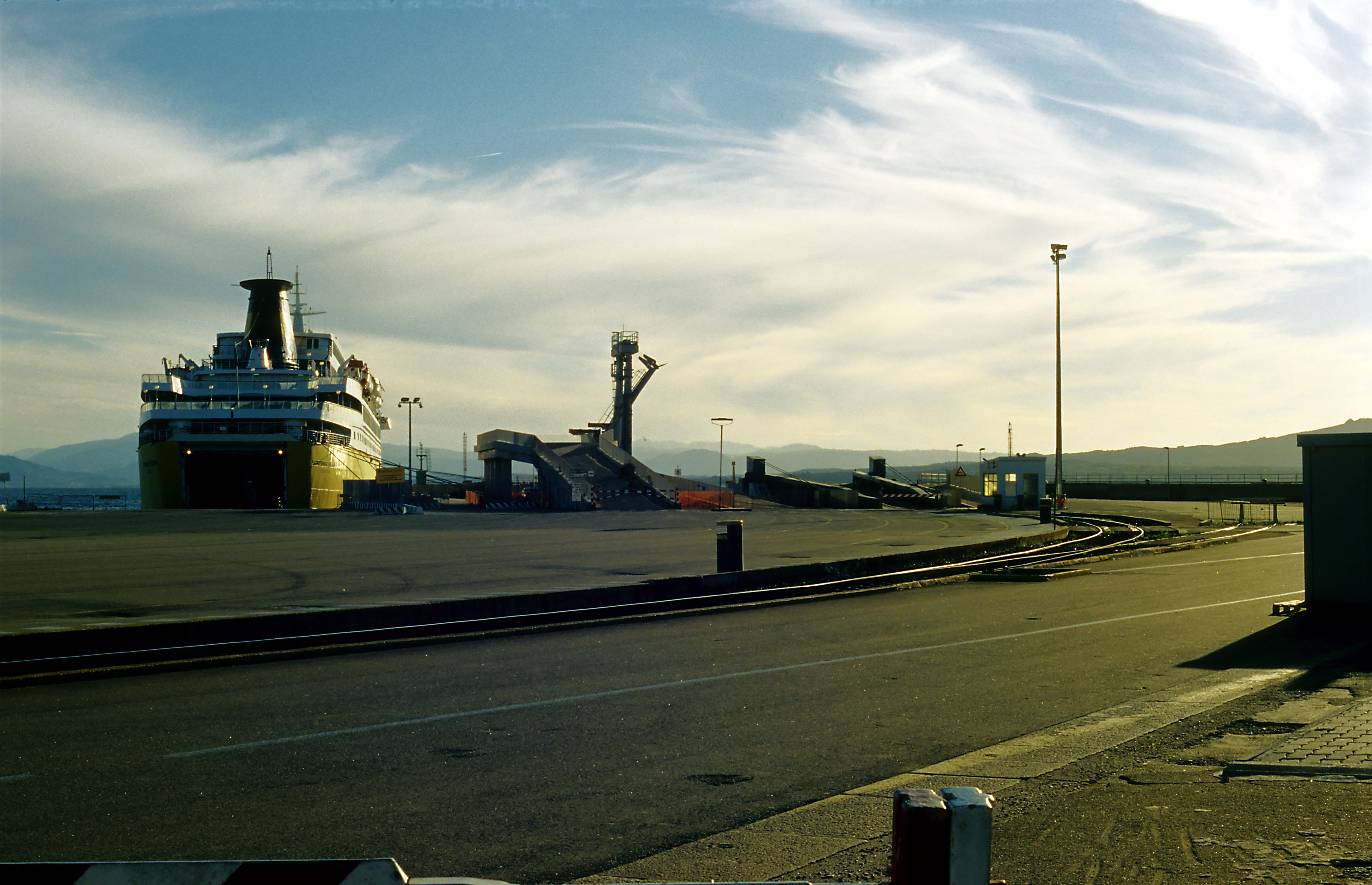 Diese im Vergleich zur anderen sichtbar modernere Fährbrücke ist zum Aufnahmezeitpunkt noch in Betrieb.